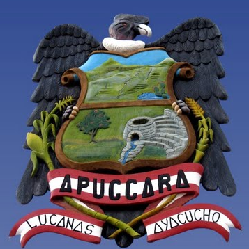 Insignia de Aucará